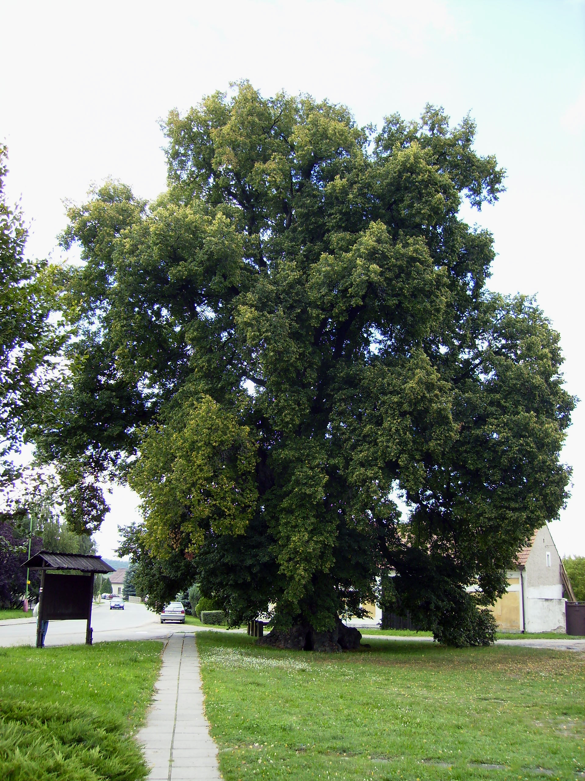 Pamatna lipa ve stredoceske Stare Lyse.